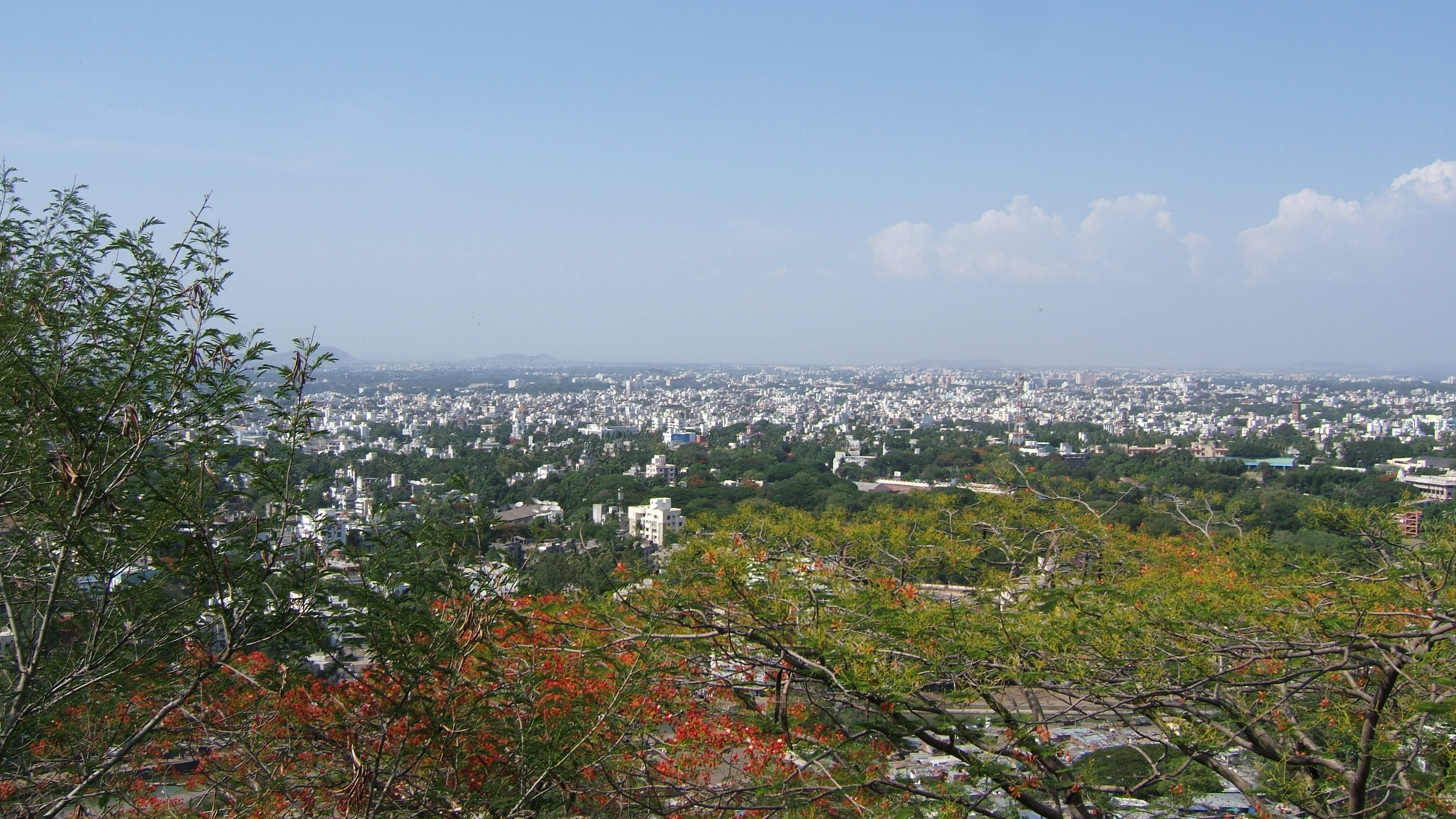 Pune, India